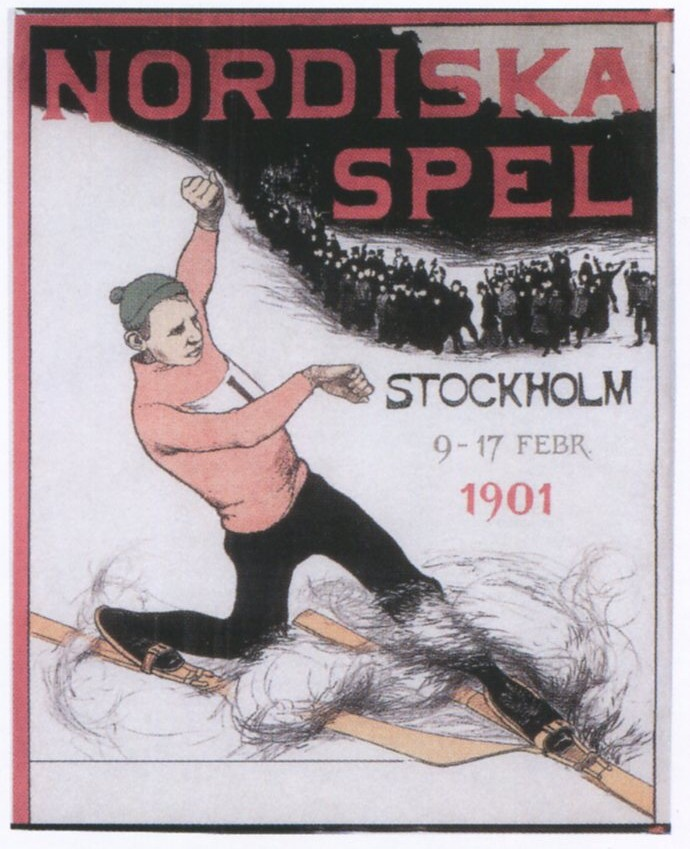 Affisch till "Nordiska Spel" 1901